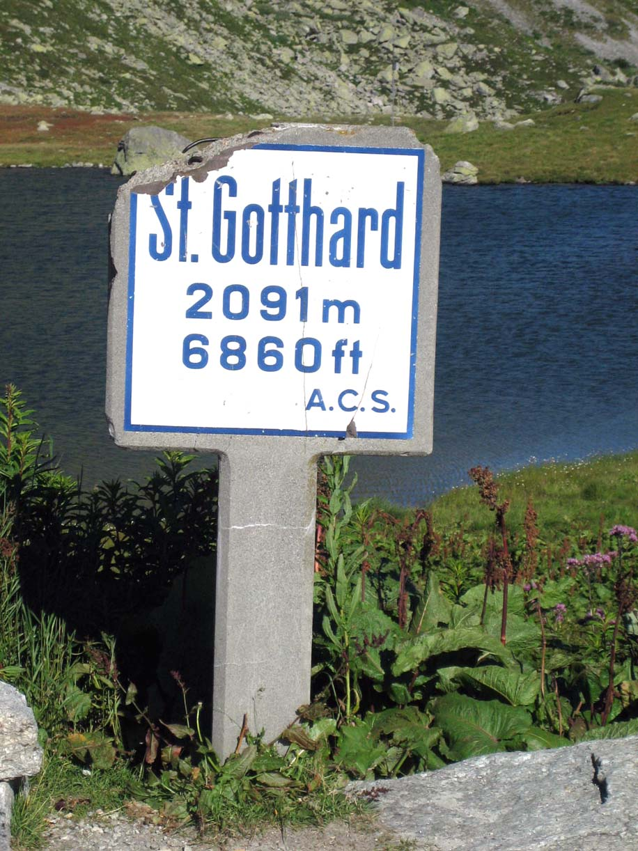 Tafel auf dem Hospiz